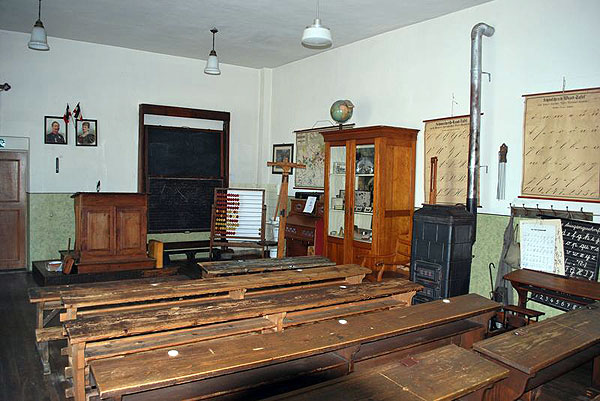 Klassenzimmer der Zeit um 1900